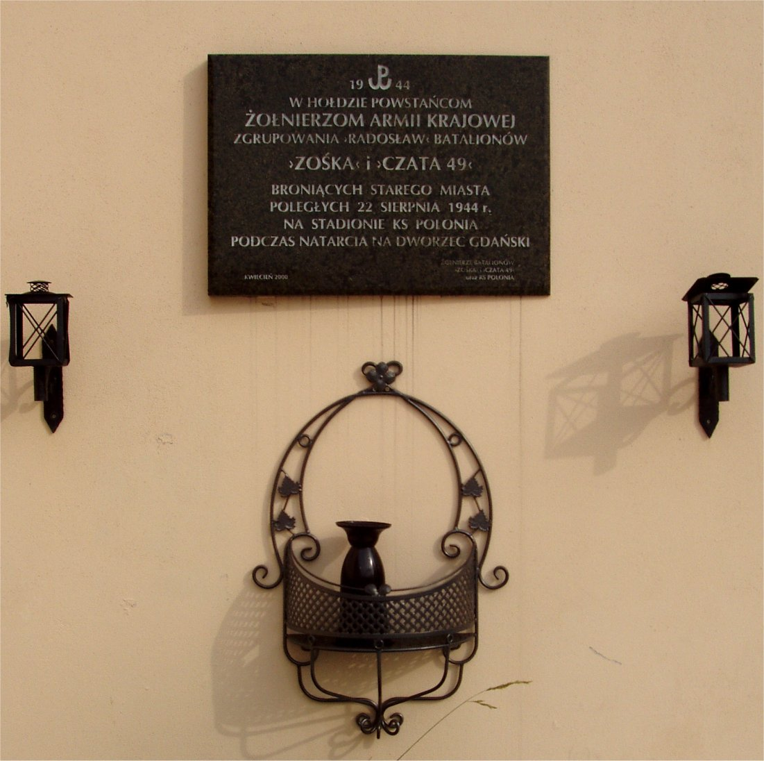 KS Polonia przy ul Konwiktorskiej w Warszawie (fot Zu)